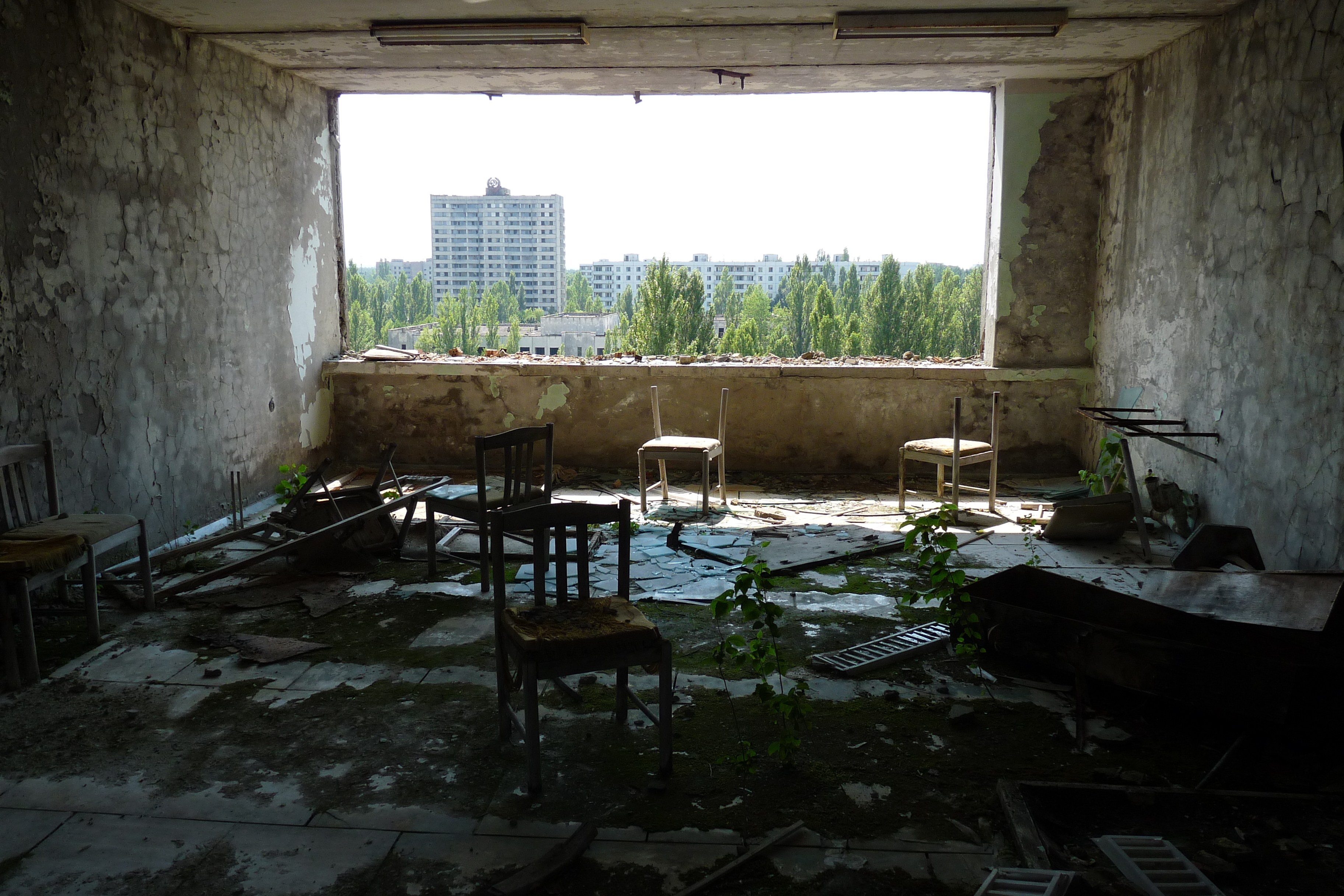 Pripyat